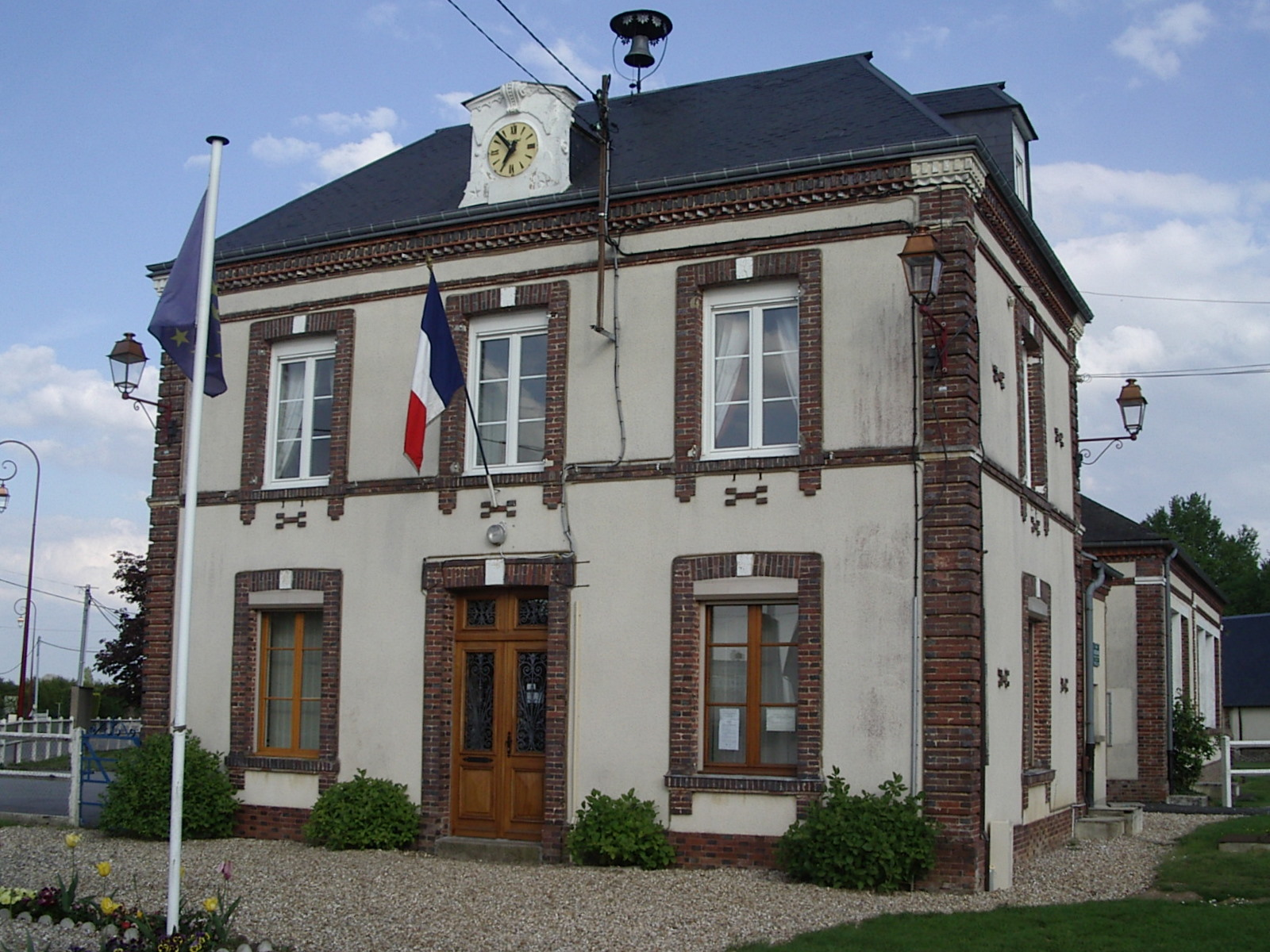 mairie d'Epinay (France, Eure)